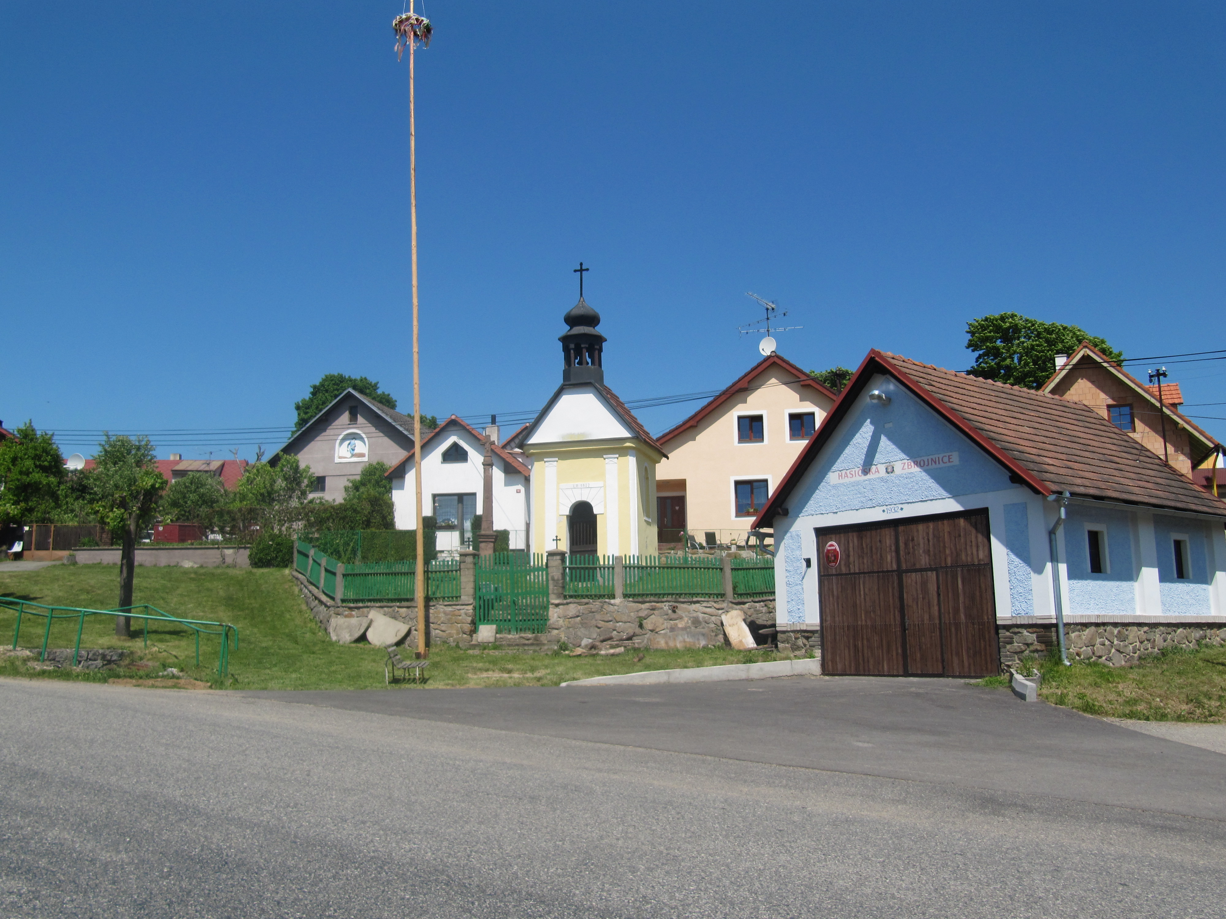 Třemošnice (Ostředek)